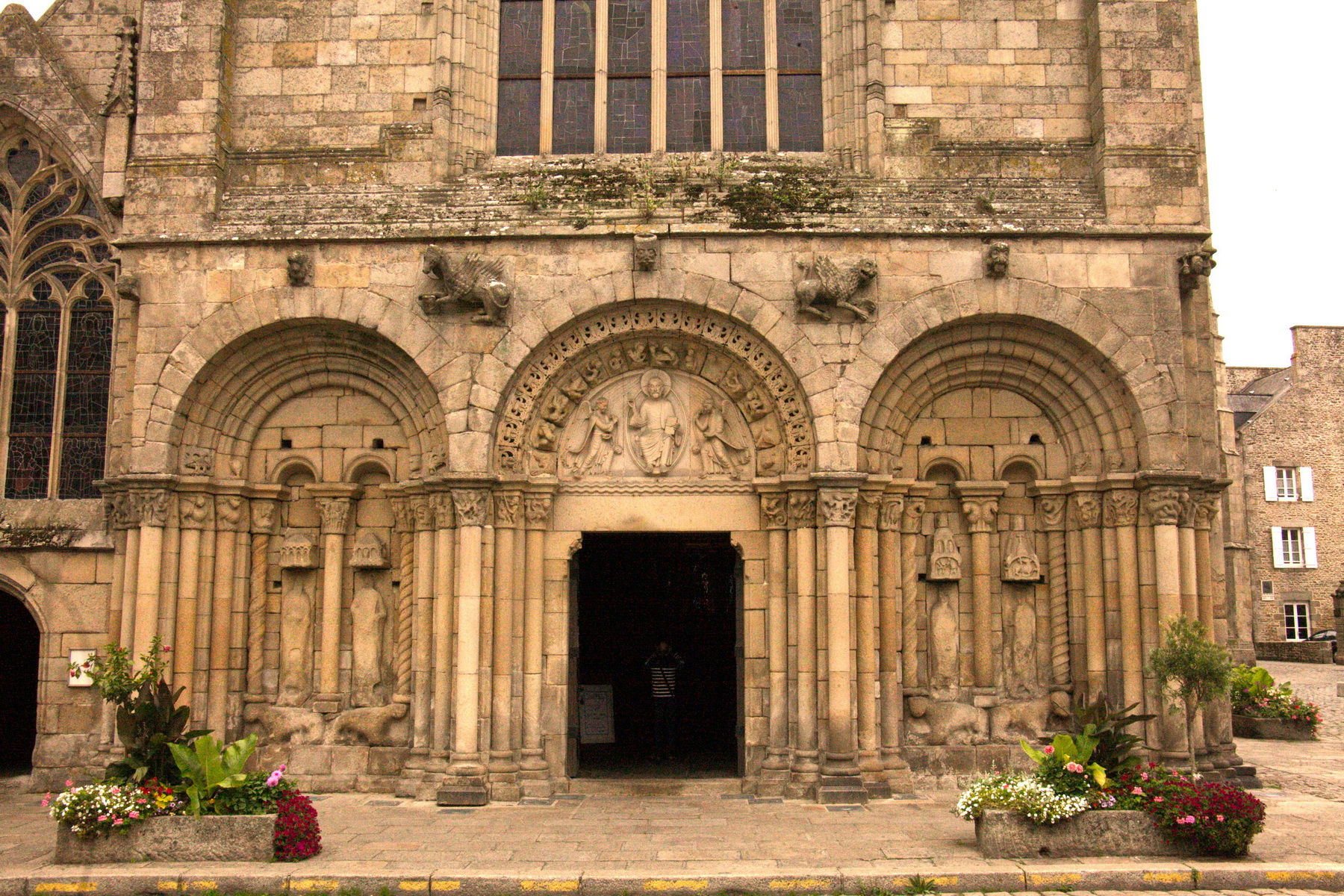 Basilique Saint-Sauveur (Classé) .